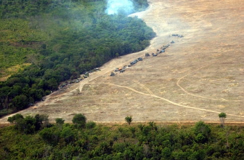 Luftaufnahme des Reservats Maraiwatséde der Xavantes